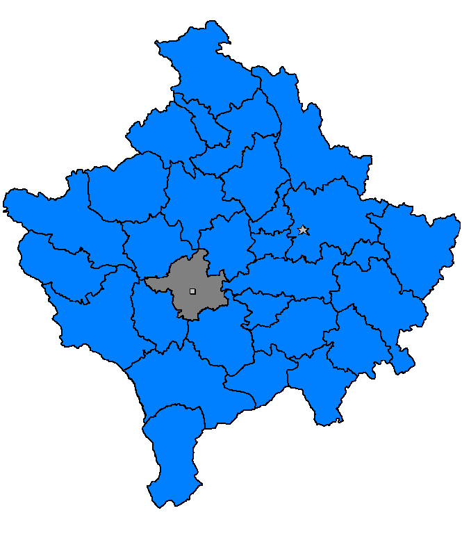 Malishevë, Kosovë 2006